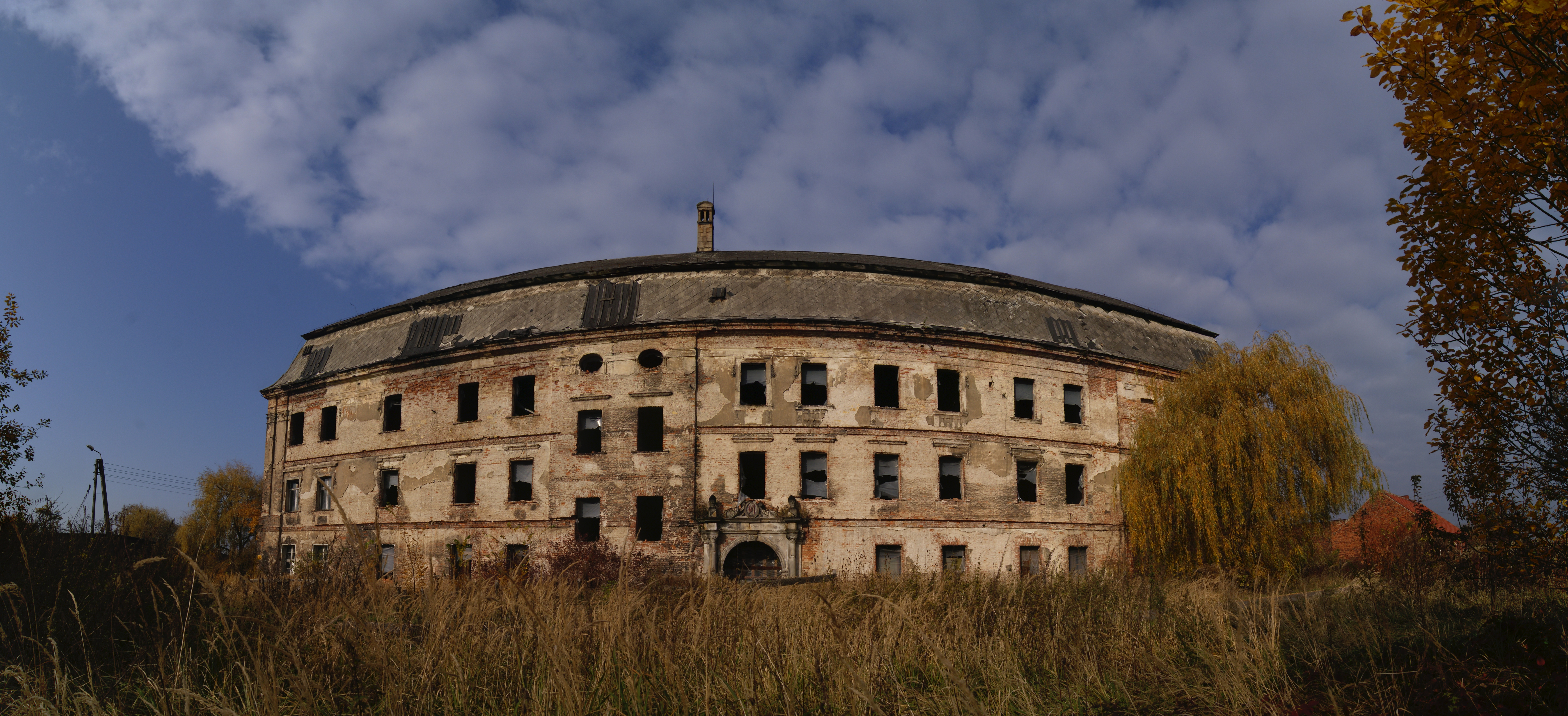 Bycina, pałac, XVII/XVIII